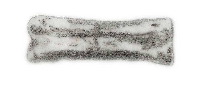 Illustration of a fossil of Teinurosaurus